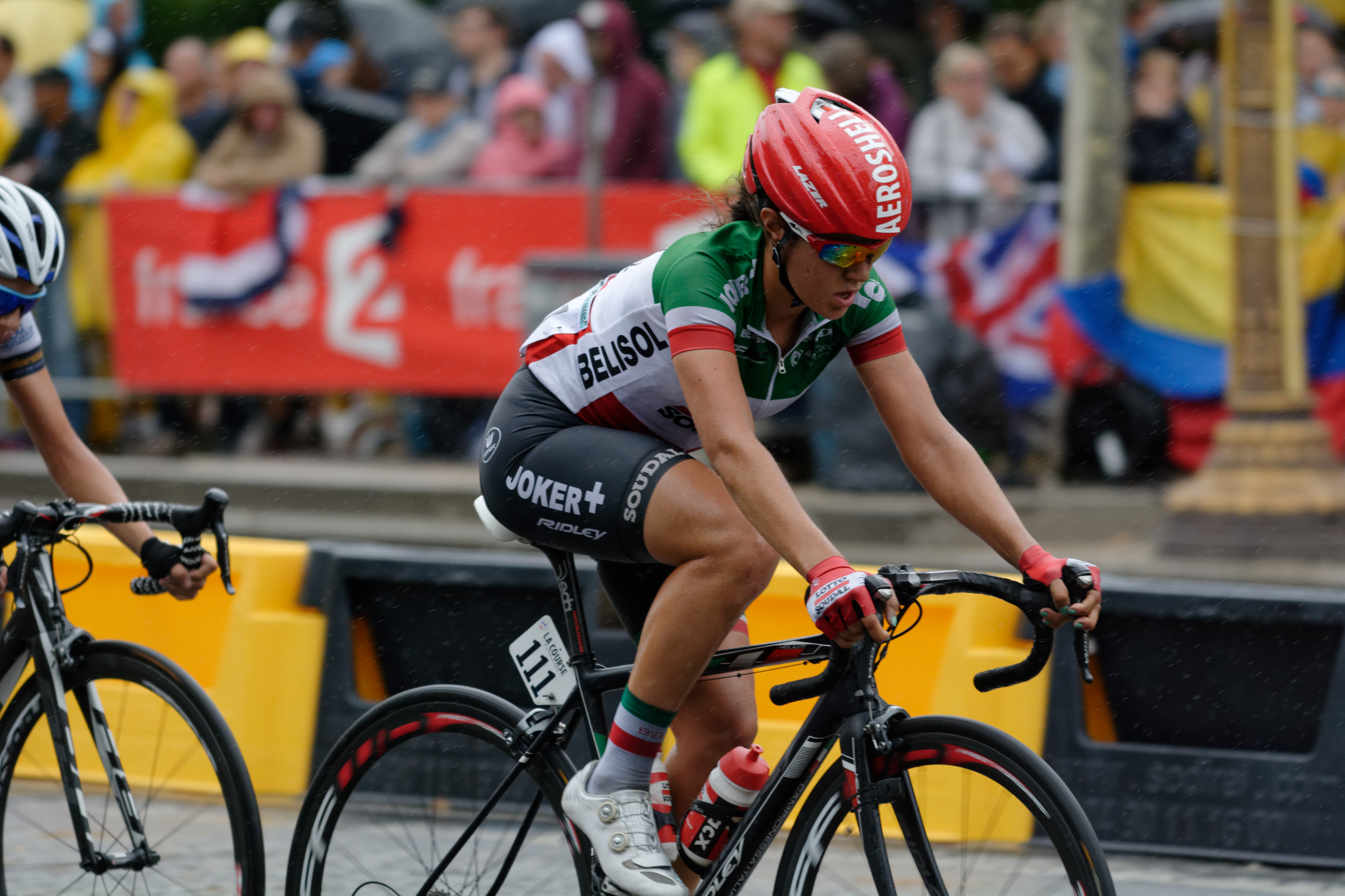 D71_2146_DxO